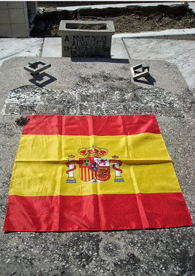 Panteón de la familia Garrido Mac Cormick en Guantánamo